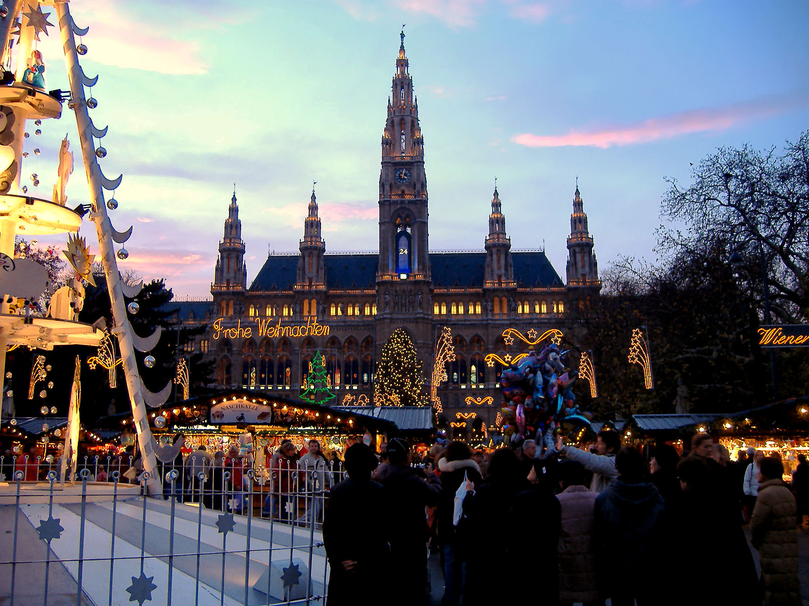 Rathaus [Viena] em Dezembro